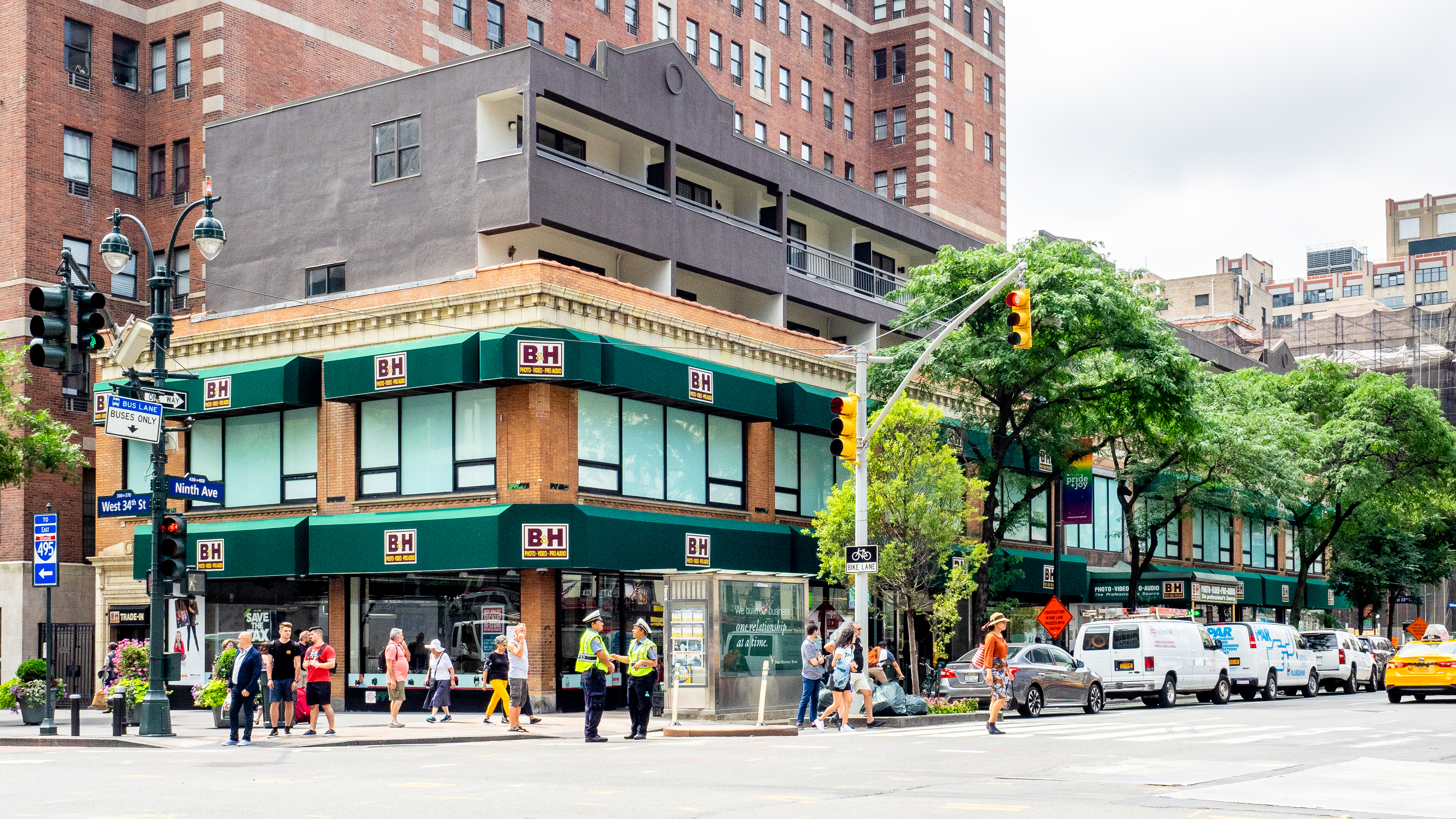 Hudson Yards, NYC